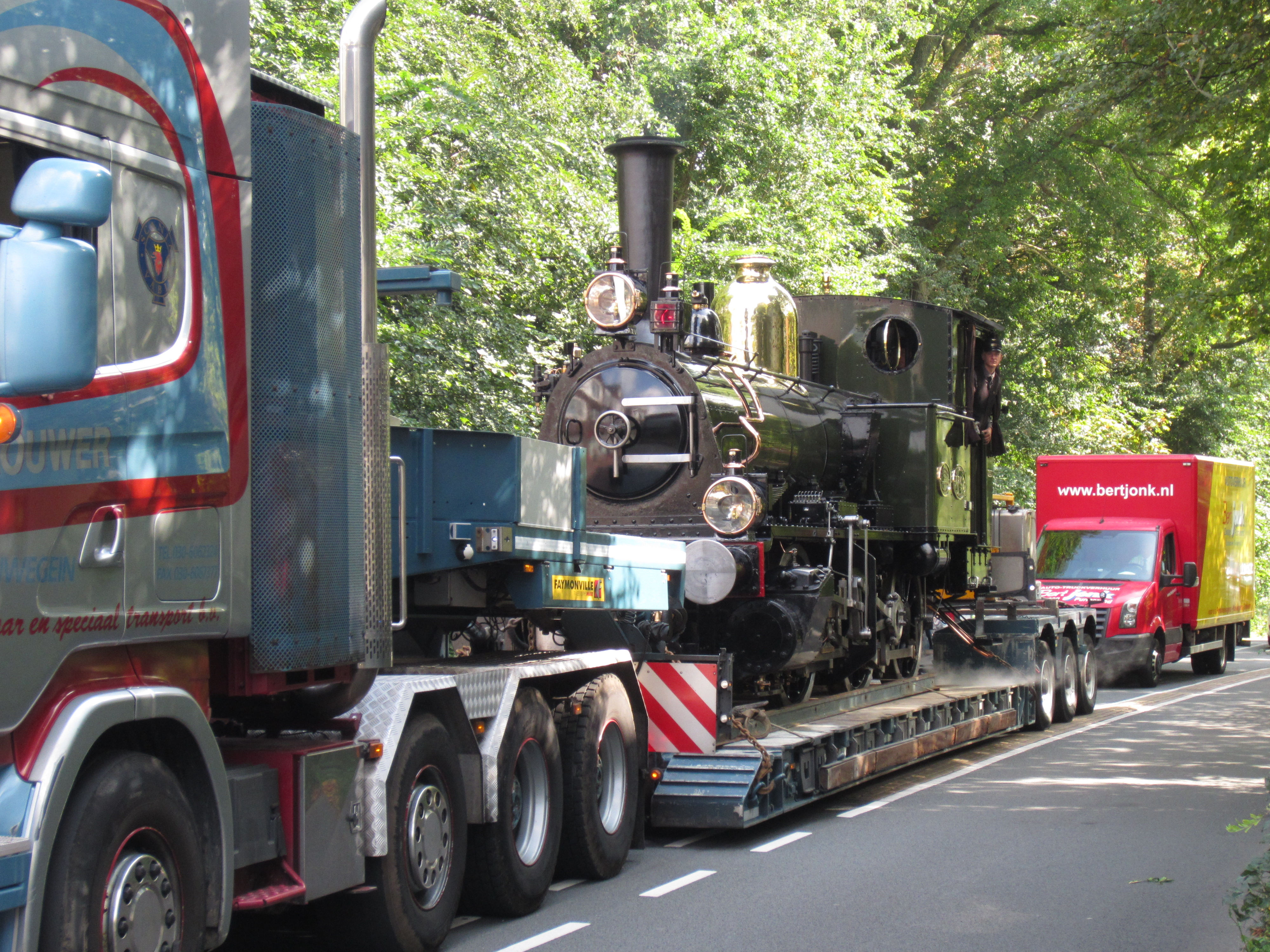 Stoomtram Bello keert op de openmonumentendag 2014 terug in Bergen.